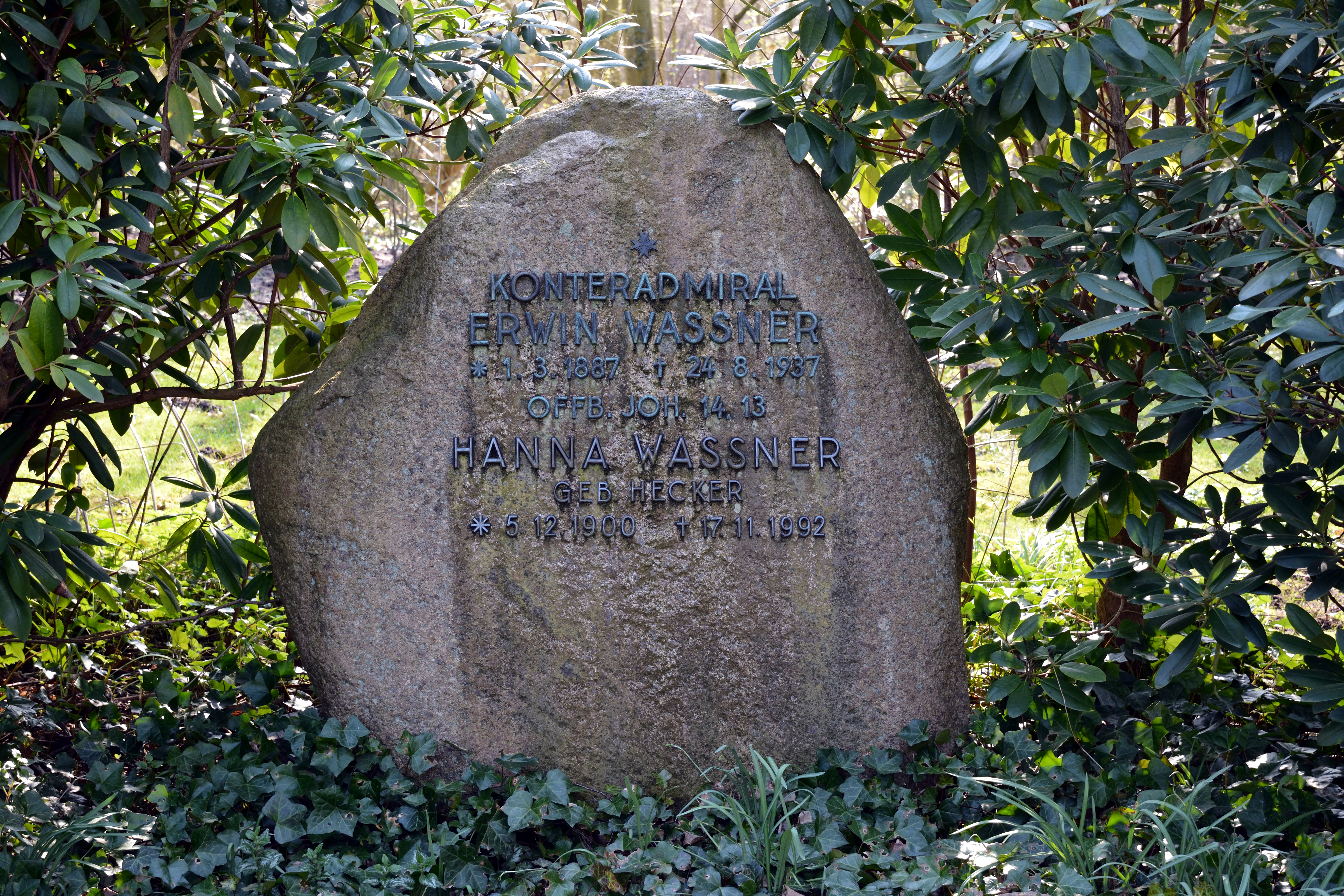 Impressionen vom Nordfriedhof in Kiel: Grab von Erwin Wassner